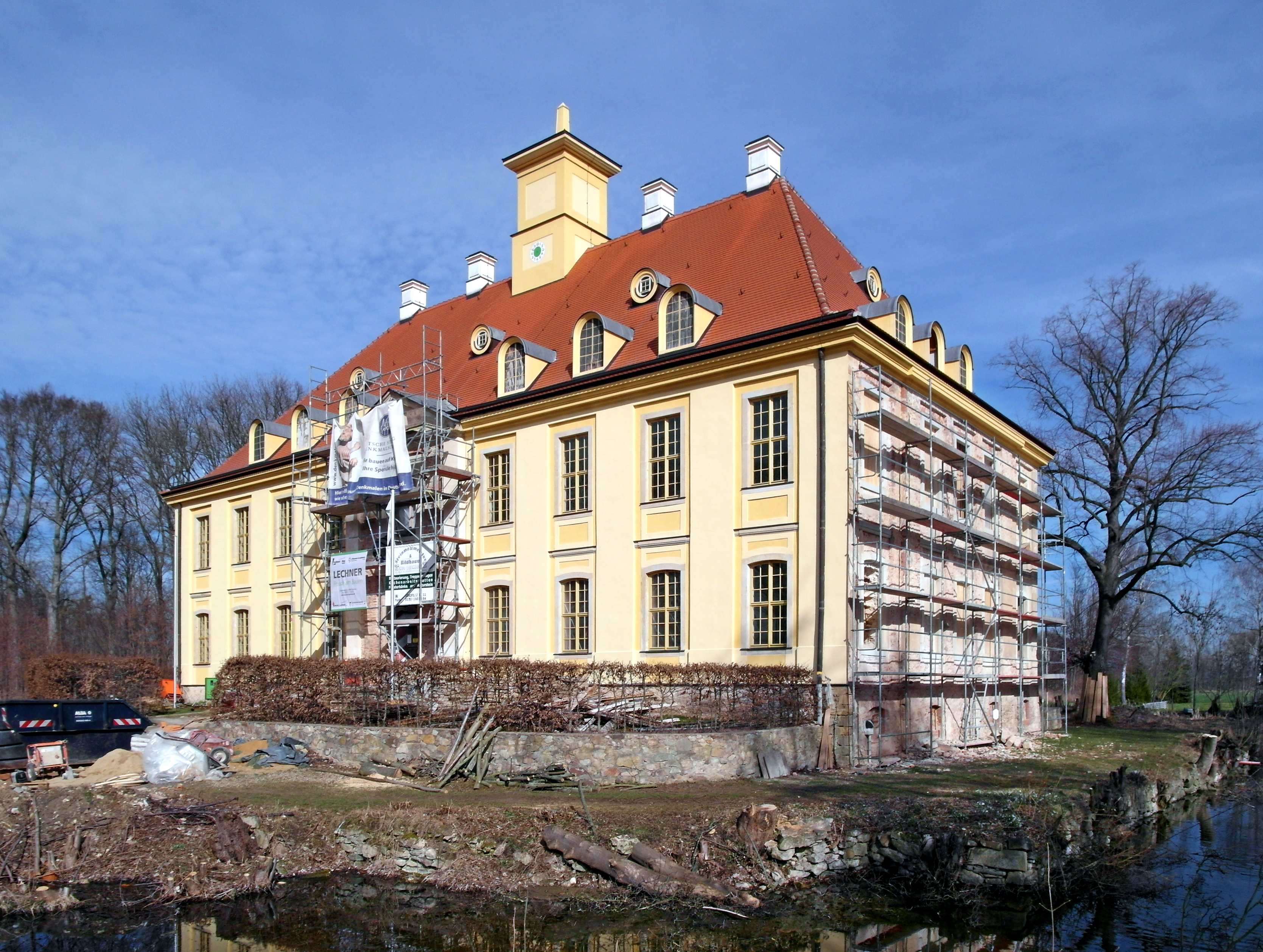 06.03.2019 Leuben (Oschatz), Hofstraße: Schloß (GMP: 51.265162,13.082736). Der Herrensitz Leuben wurde 1698 von Generalmajor Hans-Gottlieb von Thielau erworben. Sein Sohn Gotthelf Friedrich von Thielau ließ 1730 die ehemalige Wasserburg des seit 1445 bestehenden Rittergutes zum Barockschloß umbauen. Die letzten Besitzer, das Ehepaar von Zeschau, wurden 1945 enteignet. Das Schloß diente in der DDR unter anderem als Herberge für Vertriebene, Verwaltungssitz der LPG, Kindergarten und Lebensmittelgeschäft. 1974 wurde das Gebäude von der Bauaufsicht gesperrt. Seit 2004 kümmerte sich der Leubener Schloßverein um das barocke Kleinod. 2017 hat die Familie Sahrer von Sahr-Schönberg die Immobilie gekauft. Schloß von Südwesten. [SAM9810.JPG]20190306200DR.JPG(c)Blobelt